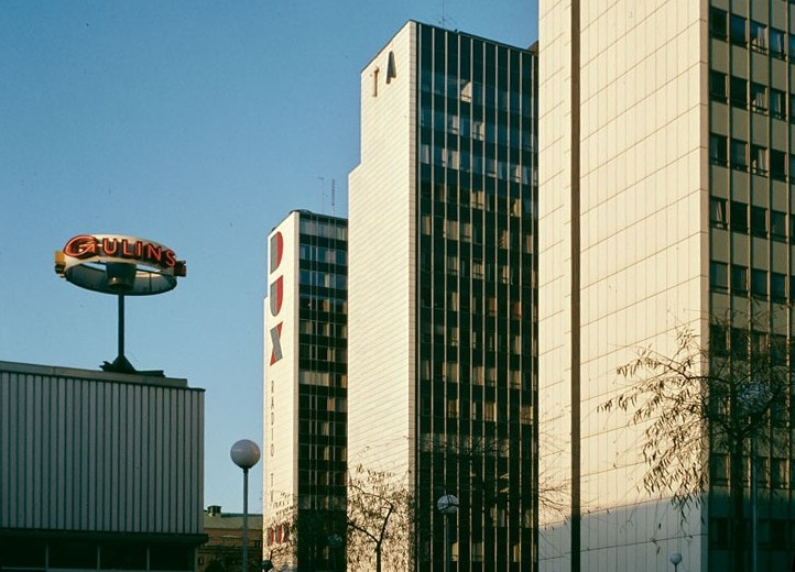 Vy från takterrassen i Hötorgscity mot de tre första Hötorgshusen och "DUX-skylten", bilden är perspektivkorrigerad och beskuren.